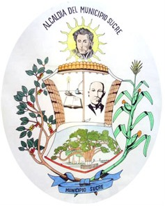 Yaracuy: escudo Sucre